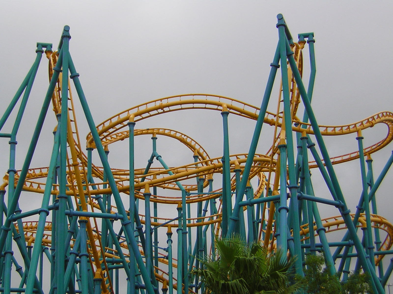 Poltergeist roller coaster at Six Flags Fiesta TexasPoltergeist